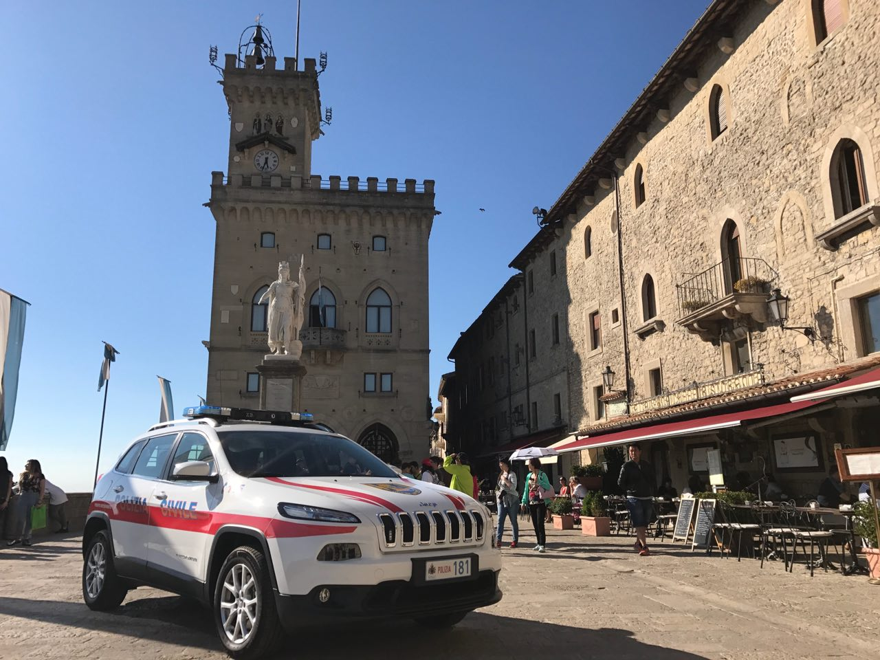 autopattuglia in dotazione alla Polizia Civile San Marino.